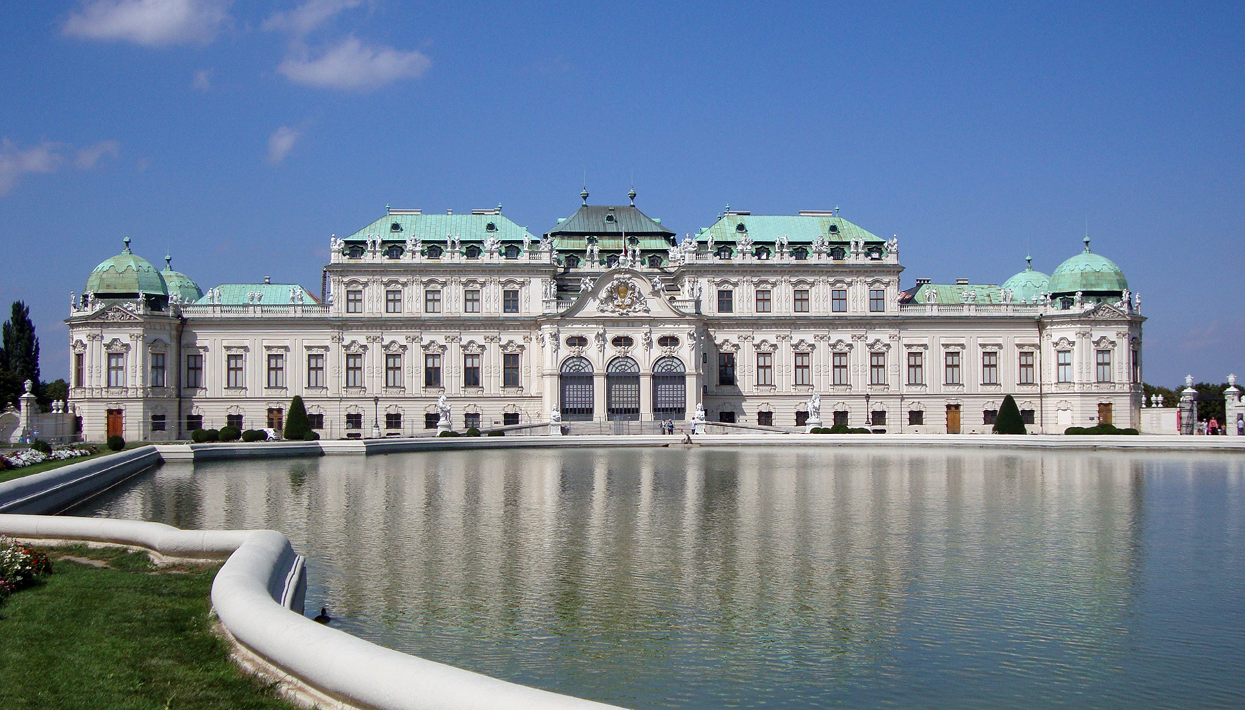 Fasada frontowa górnego Belvederu w Wiedniu.